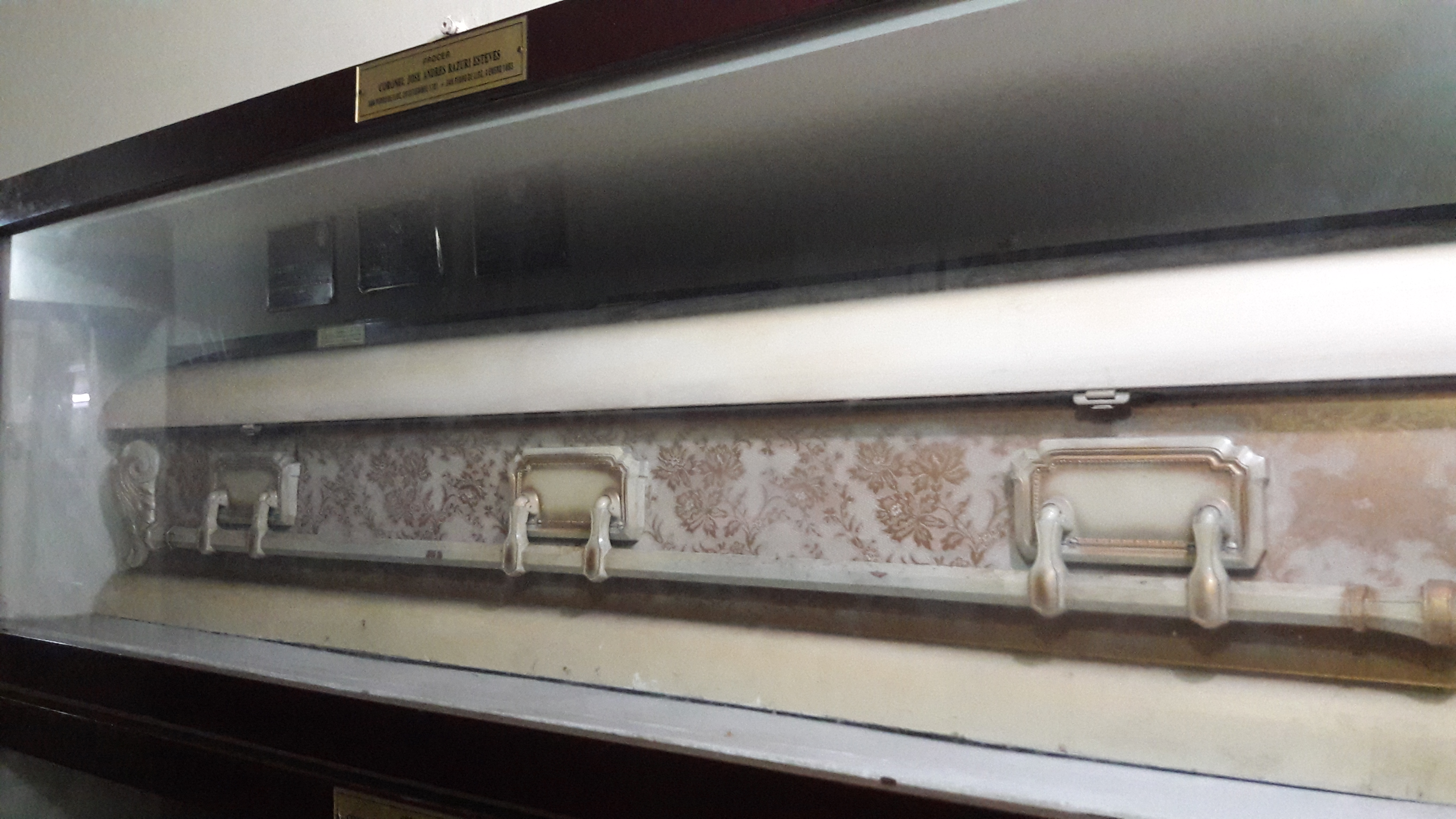 Tumba de José Andrés Rázuri